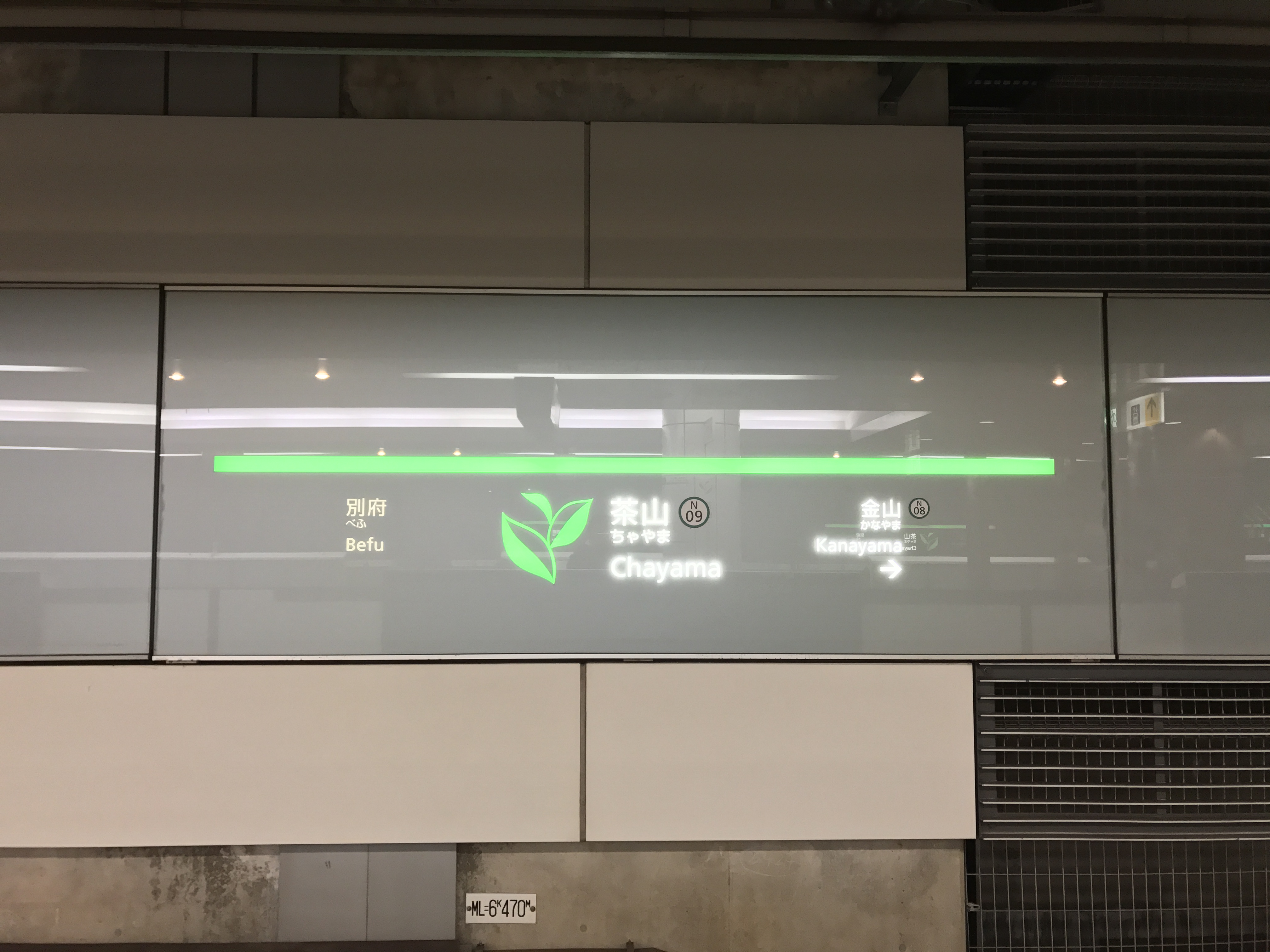 茶山駅(福岡県)の駅名標。イラストは茶っ葉